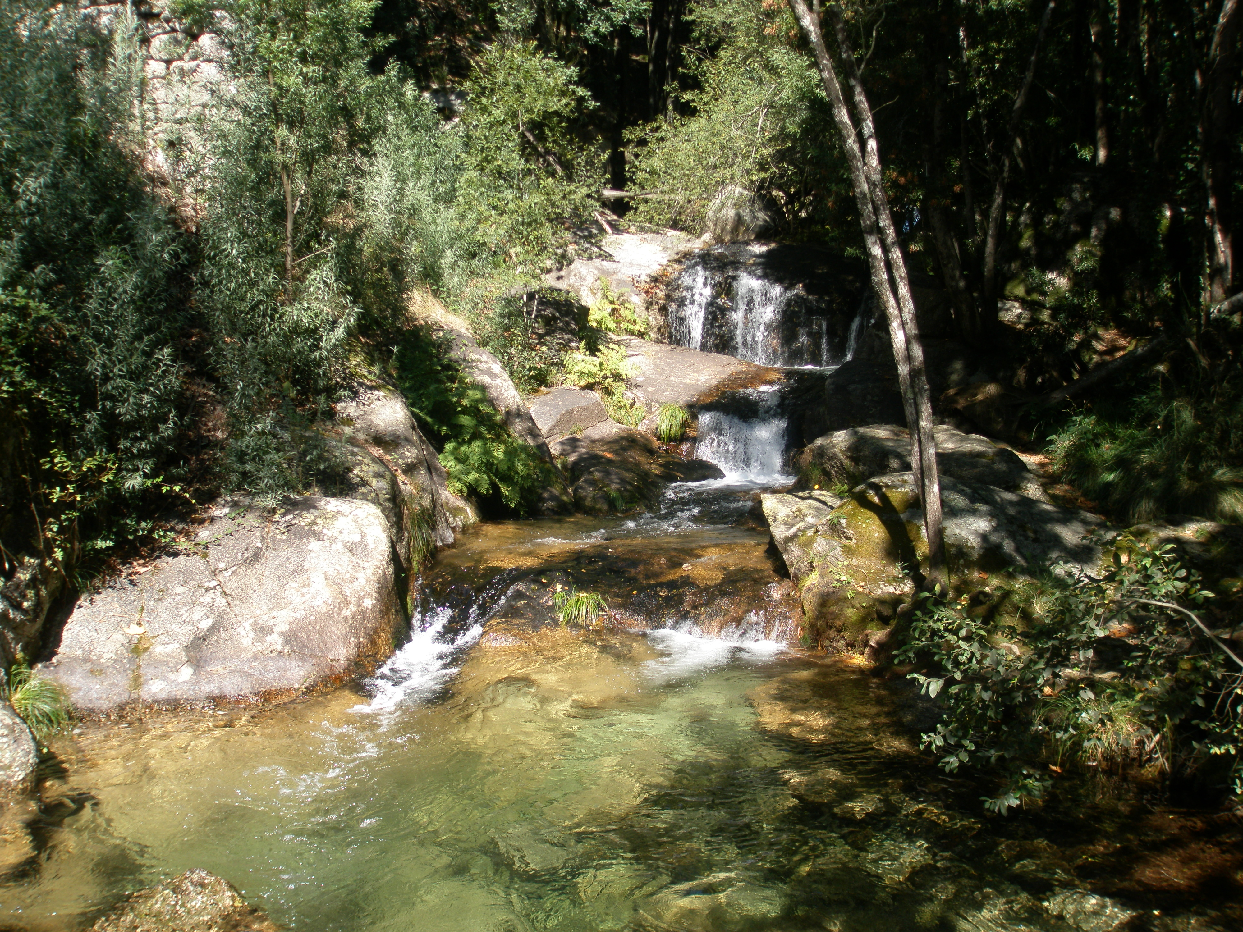 As águas cristalina do Rio Nava